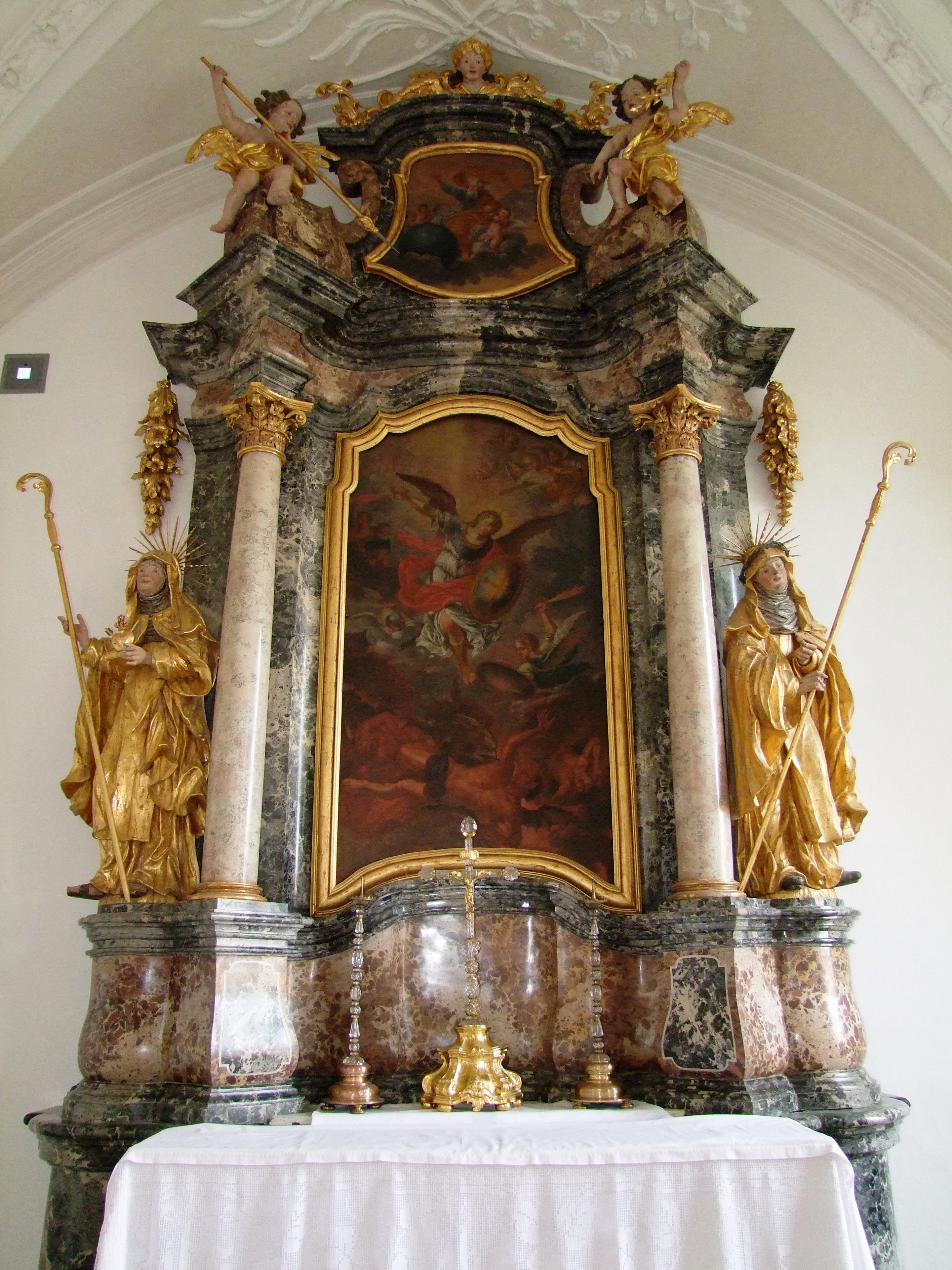 Hochaltar in der ehemaligen Sakristei der Kartause Buxheim, Stuckmarmor von Dominikus Zimmermann (1711), Altarbild des Hl. Michaels und Sturz Luzifers von Johann Friedrich Sichelbein (1710), Heiligenfiguren von Johann Georg Reusch, sie stellen vermutlich Gertrud von Helfta und Mechthild von Hackeborn dar), Das Altarkreuz um 1719/1720, Holzkern mit Metallauflage, graviertes Kristallglas spezielle durch seine Fertigung eine eher seltene Arbeit mit hohem Glasanteil von erheblichem kunsthandwerklichen Anspruch und Wert. Leuchter um 1820, nachbarocke Tradition - aus Metall und Glas aufgrund der Stilistik in der Glasverarbeitung offenbar im Nachhinein als Zugabe zum Kristallkreuz gefertigt.